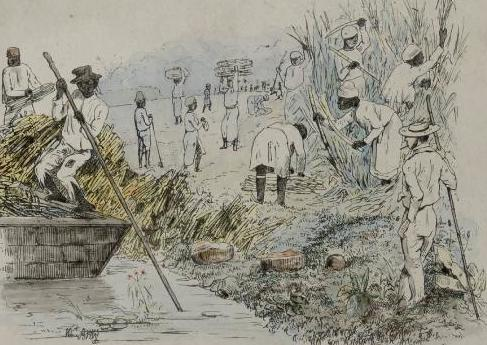 Litho. Ingekleurde litho door Petit naar een tekening van Théodore Bray (no. 12/25). Voorstelling van het oogsten van suikerriet op een slavenplantage. Rechts een 'blankofficier', de Europese opzichter. Links op de voorgrond een zogenoemde pondo, een vaartuig met platte bodem waarmee het riet naar de plantage werd vervoerd.. Ingekleurde litho voorstellende de oogst op een suikerrietplantage